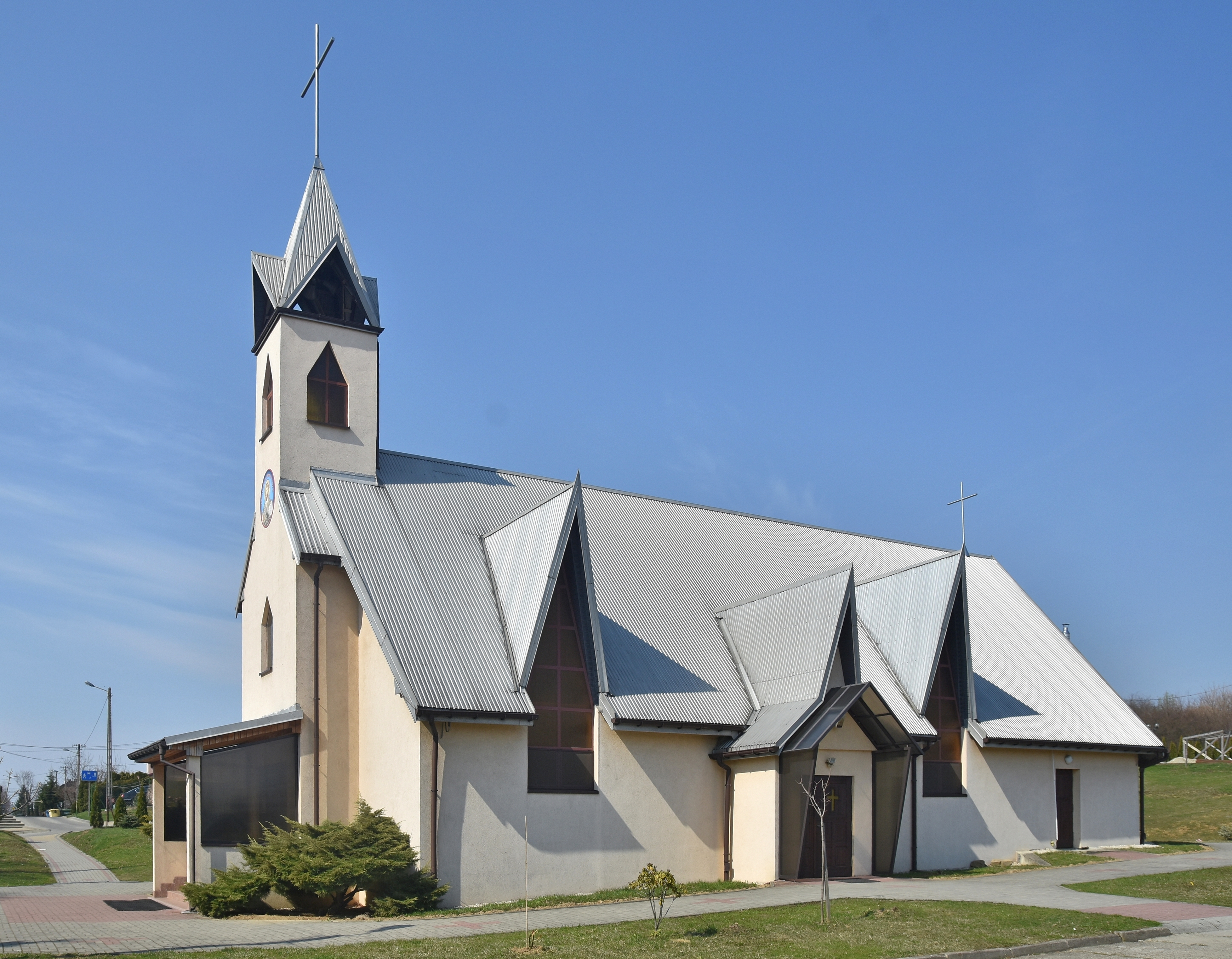 miasto Jasło